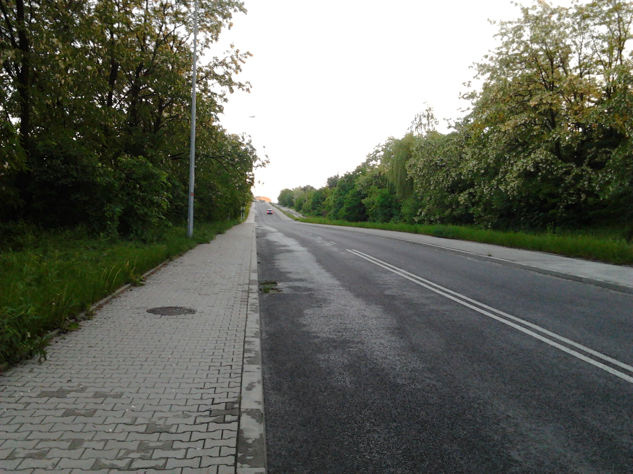 ul. Rotmistrza Pileckiego (obwodnica KN-2)